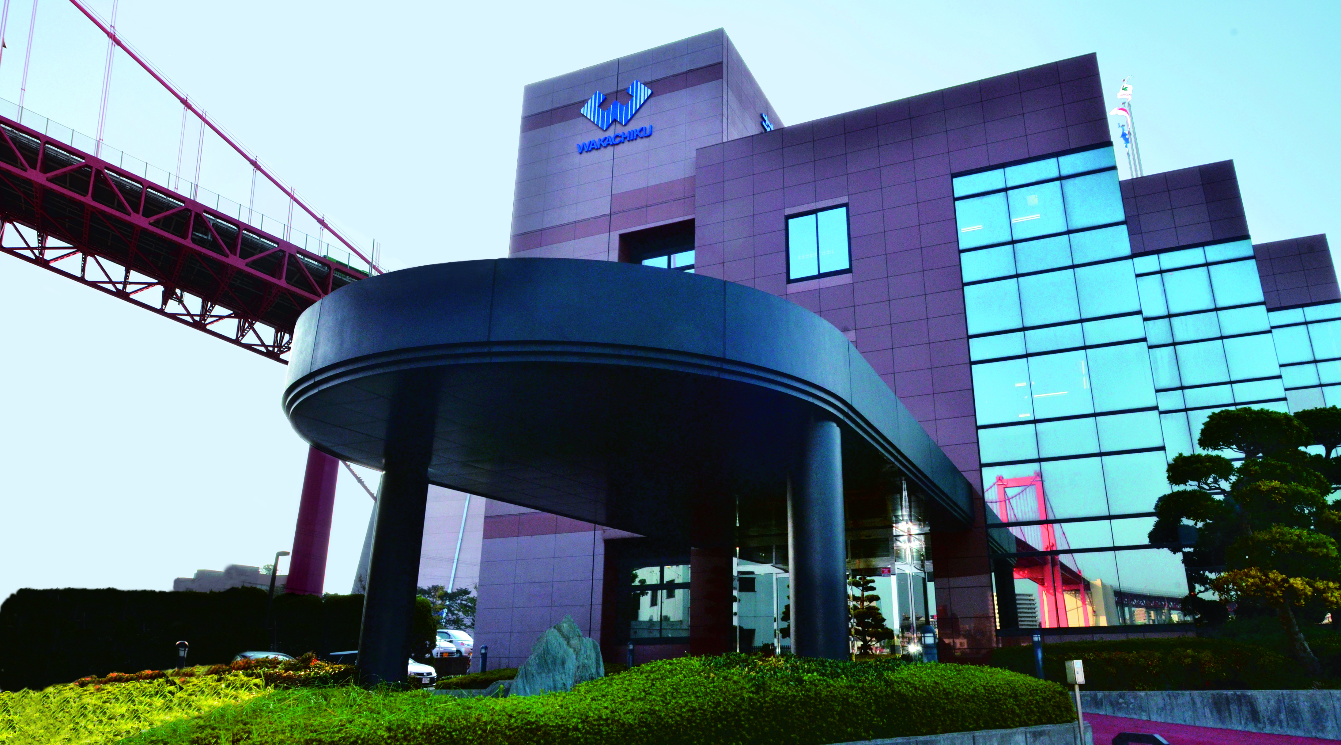 北九州市若松区にある本店